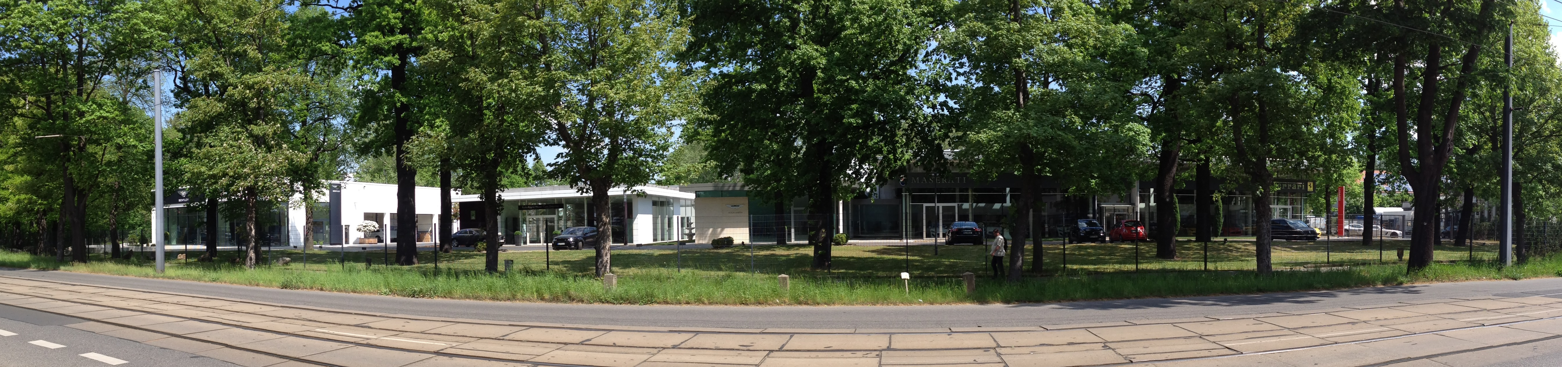 Radebeul, Meißner Straße, Thomas Automobile gegenüber AWD (von re: Ferrari, Maserati, Aston Martin, Rolls-Royce und Bentley)